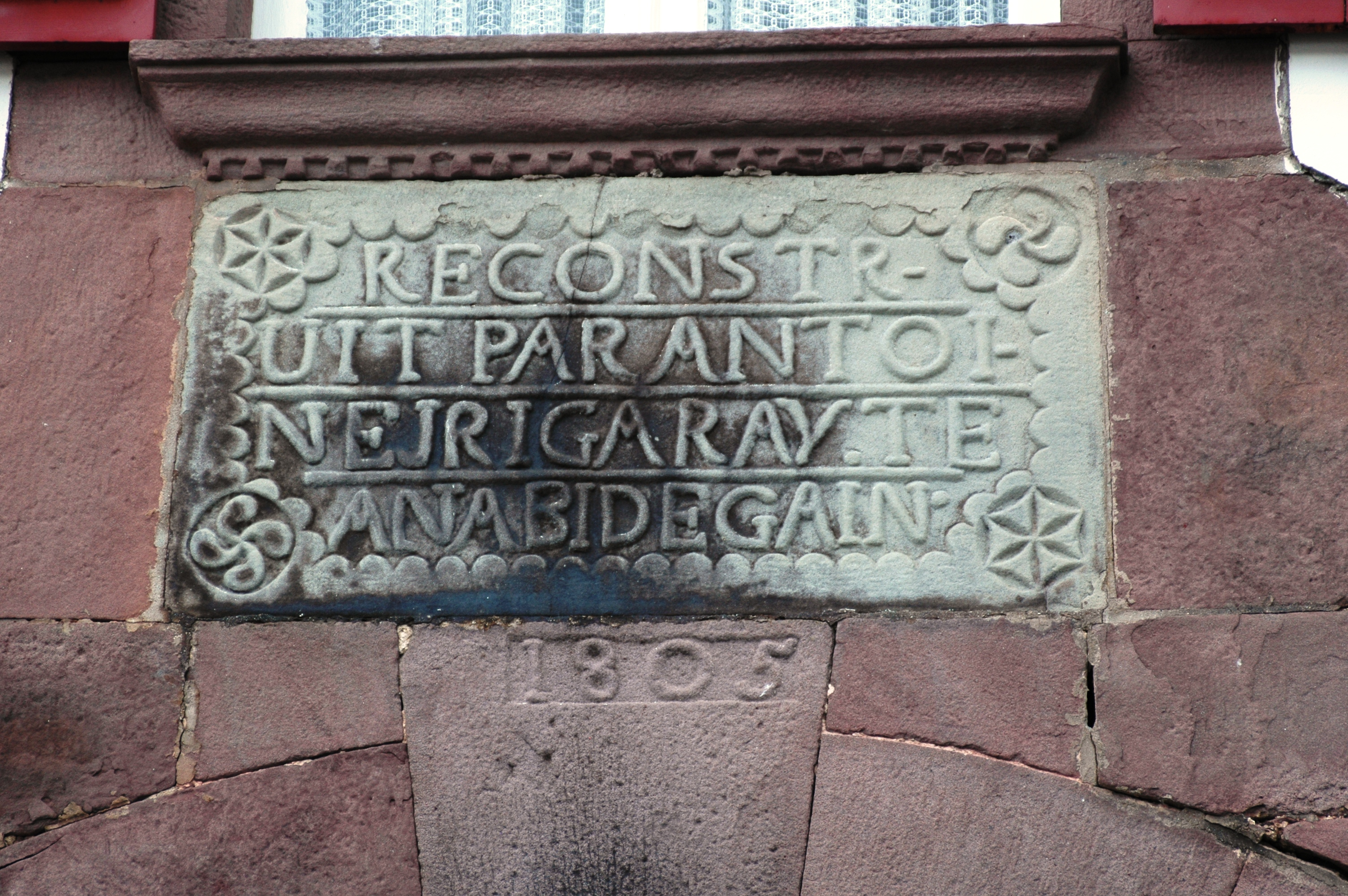 Saint-Michel, linteau sculpté